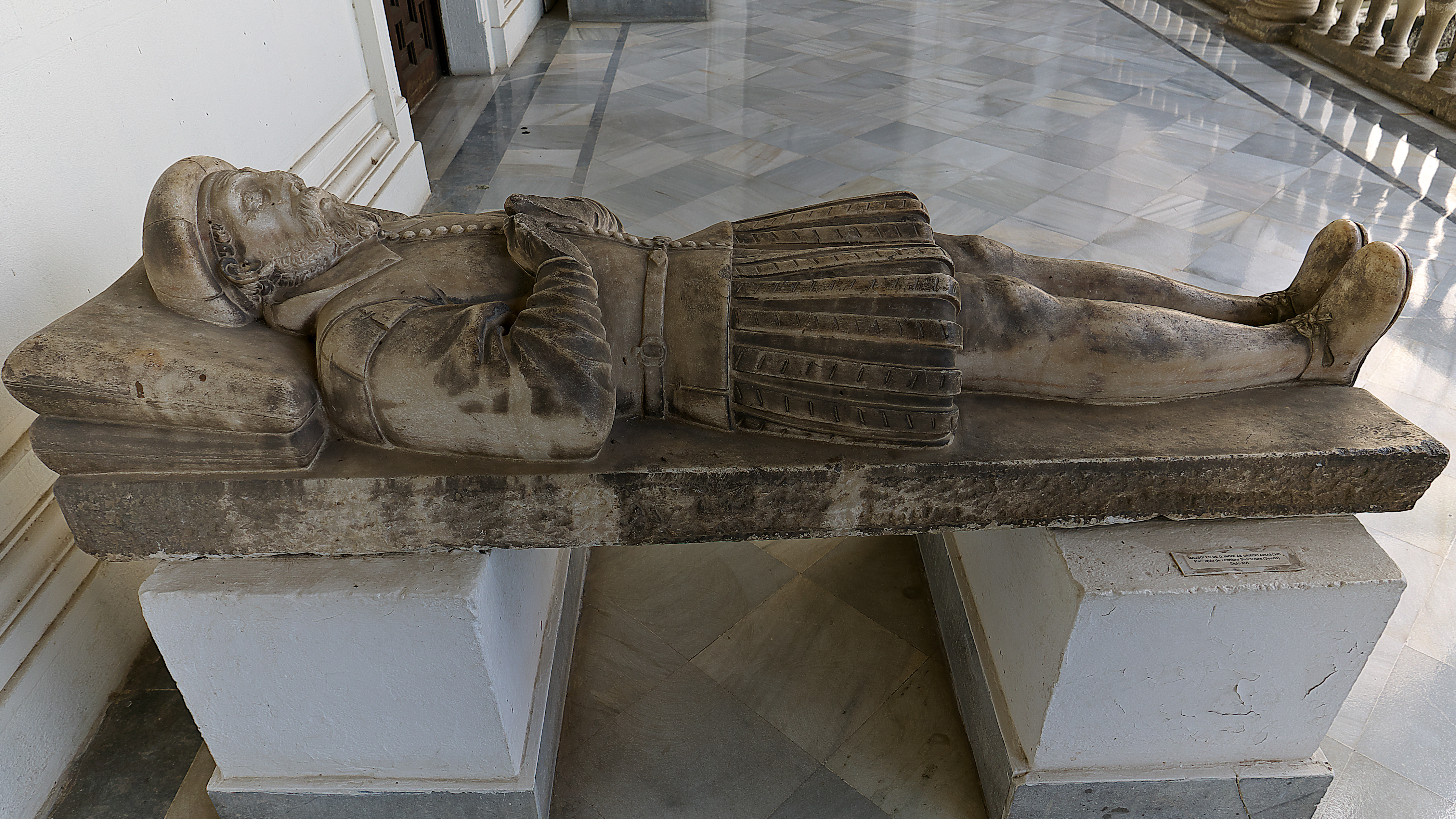 Museo Arqueológico de Sevilla. Escultura funeraria (1634) de Nicolas Griego Triarchi o Nicolás Griego Ariascho (†1598), al que se atribuye la fundación del Convento de San Basilio (Sevilla). La escultura de mármol es obra de Gaspar Luis y procede de su última ubicación en la Iglesia de Omnium Sanctorum (Sevilla)